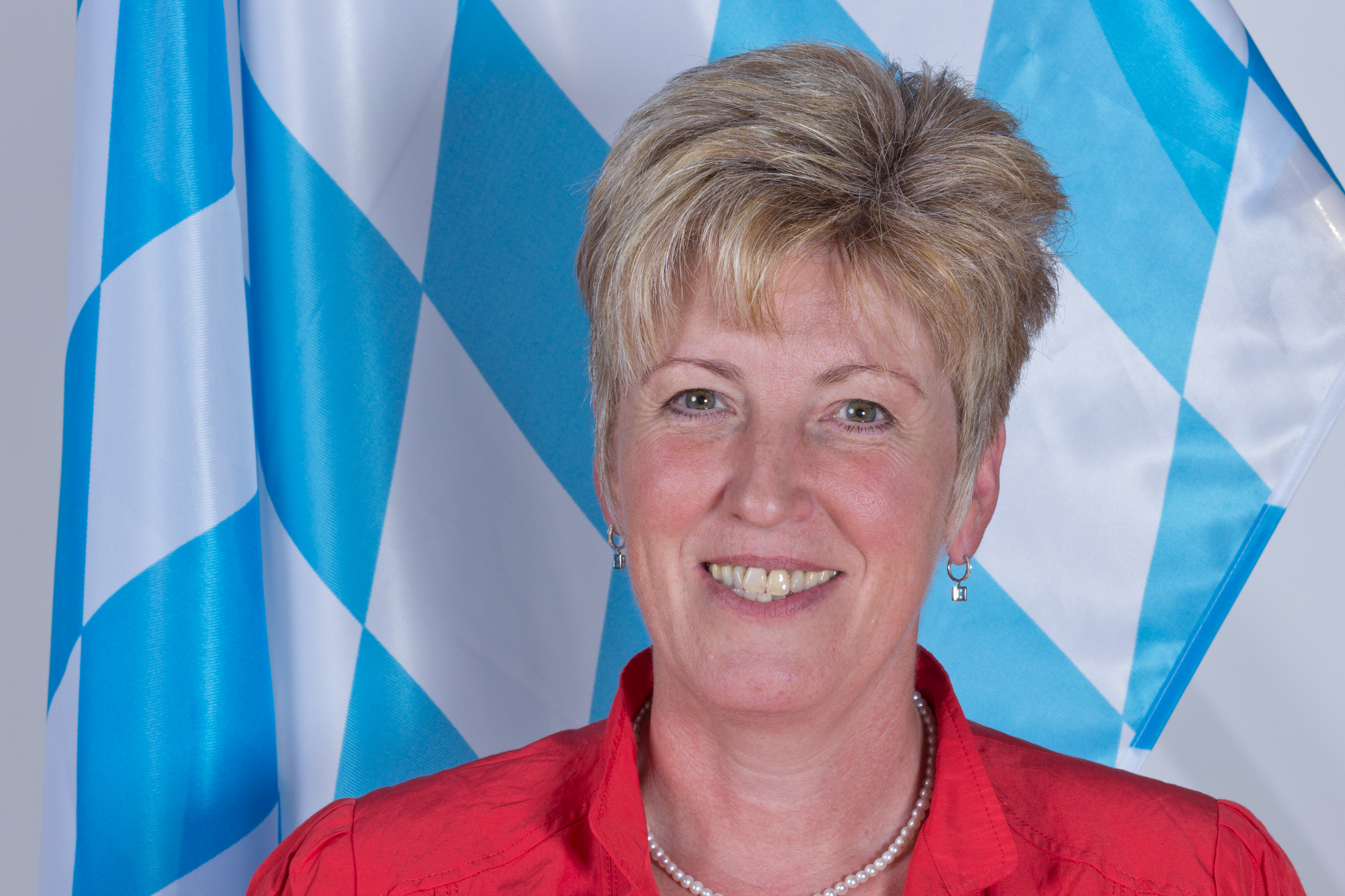 Wikipedia im Landtag – Bayern 17. bis 19. Juli 2012 in MünchenDieses Foto wurde im Rahmen des Projektes „Wikipedia im Landtag“ erstellt.